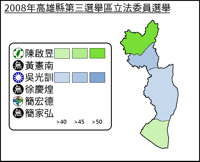 2008年高雄縣第三選舉區立法委員選舉得票